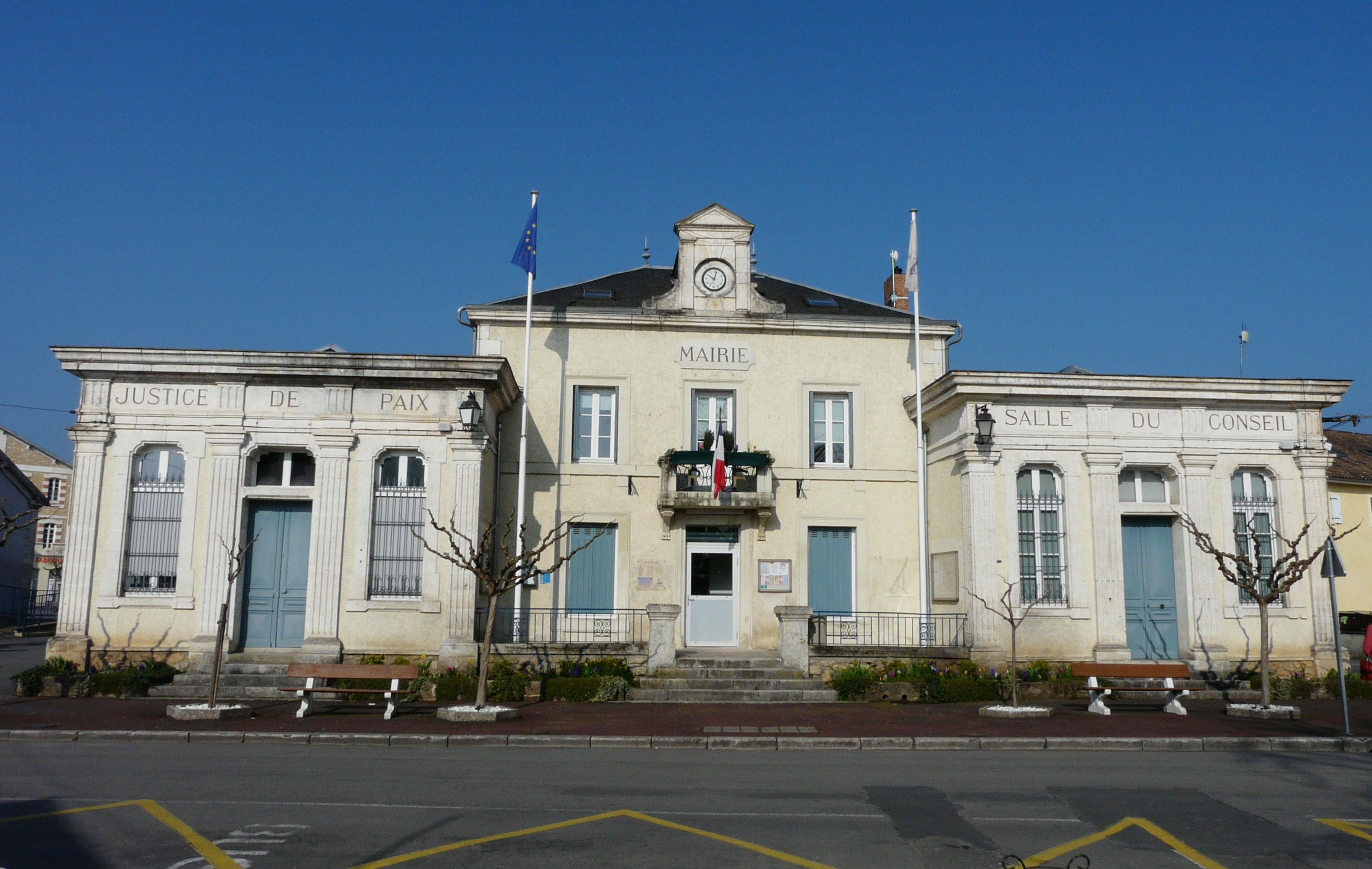 La mairie de Saint-Astier, Dordogne, Frnace.